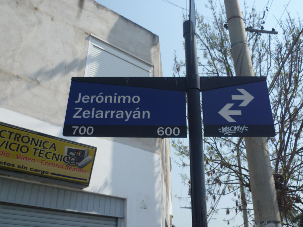 Calle Jerónimo Zelarrayán en Córdoba (Capital)